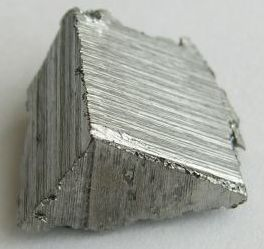 Bildbeschreibung: Erbium * Quelle: Foto aus meiner Elementesammlung * Fotograf/Zeichner: Tomihahndorf * Datum: April 2006